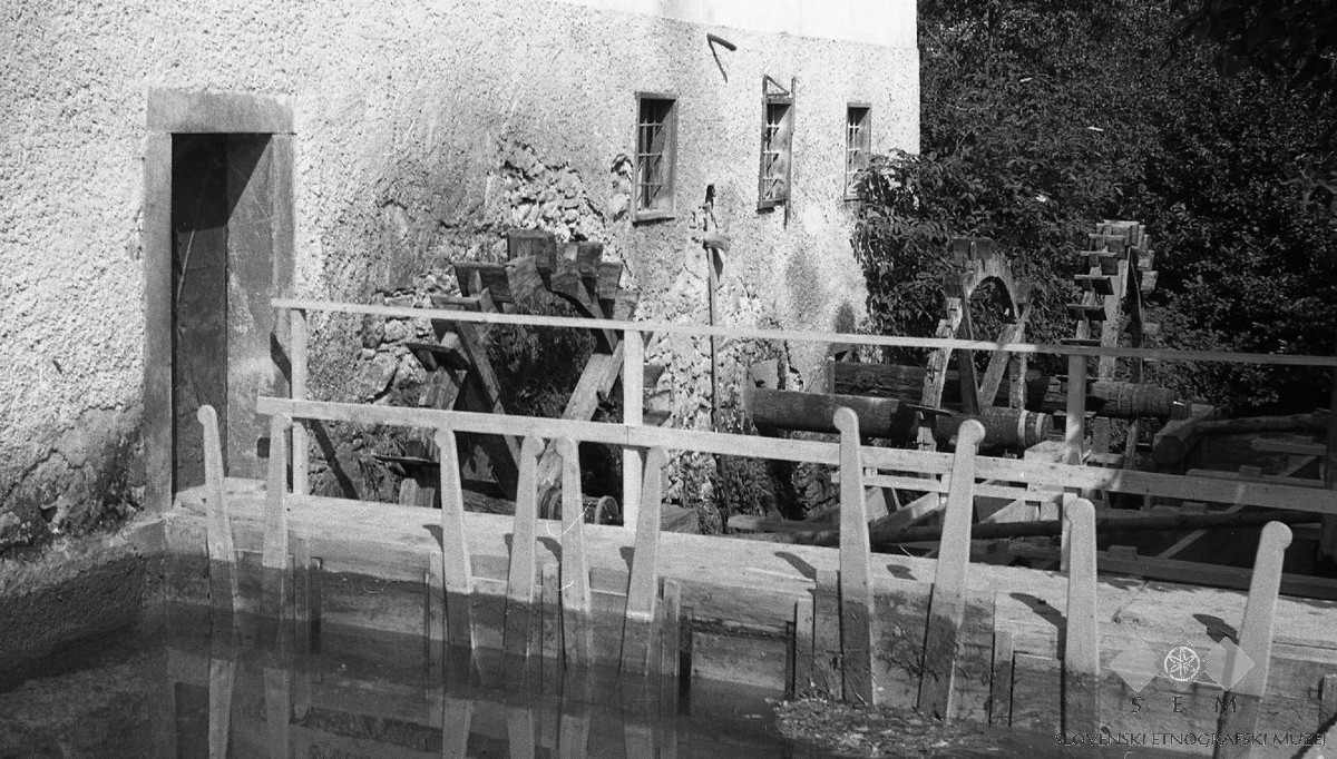 Mlin - mlinska kolesa, Kaplanovo.